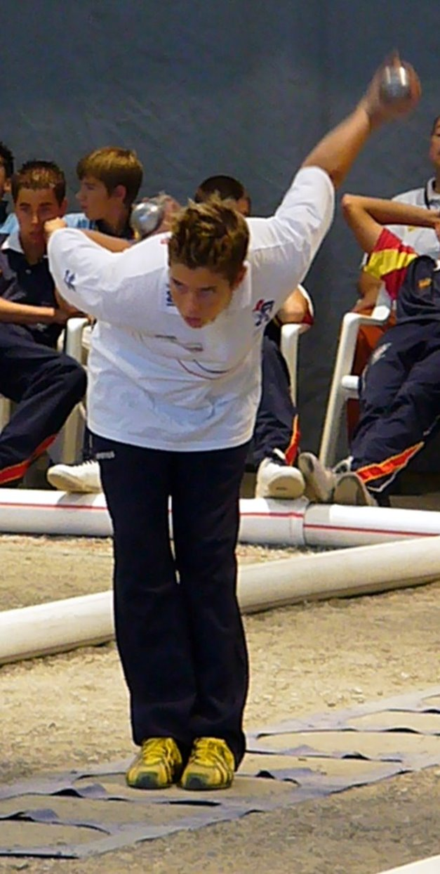 Dylan Rocher (Francja) podczas konkursu strzału precyzyjnego na Mistrzostwach Europy Juniorów w Pétanque w Martigny (2006).